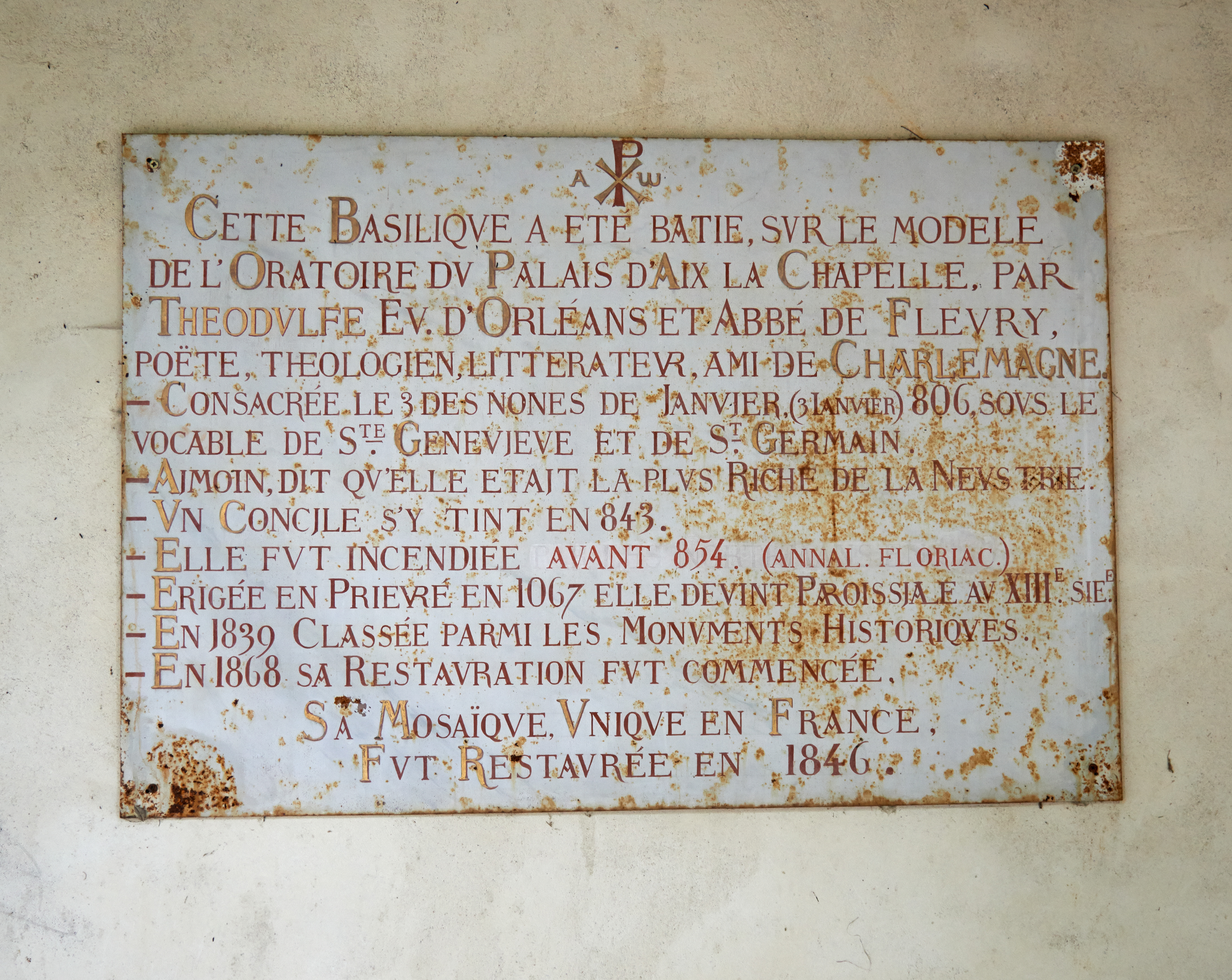 Église de la Très-Sainte-Trinité de Germigny-des-Prés